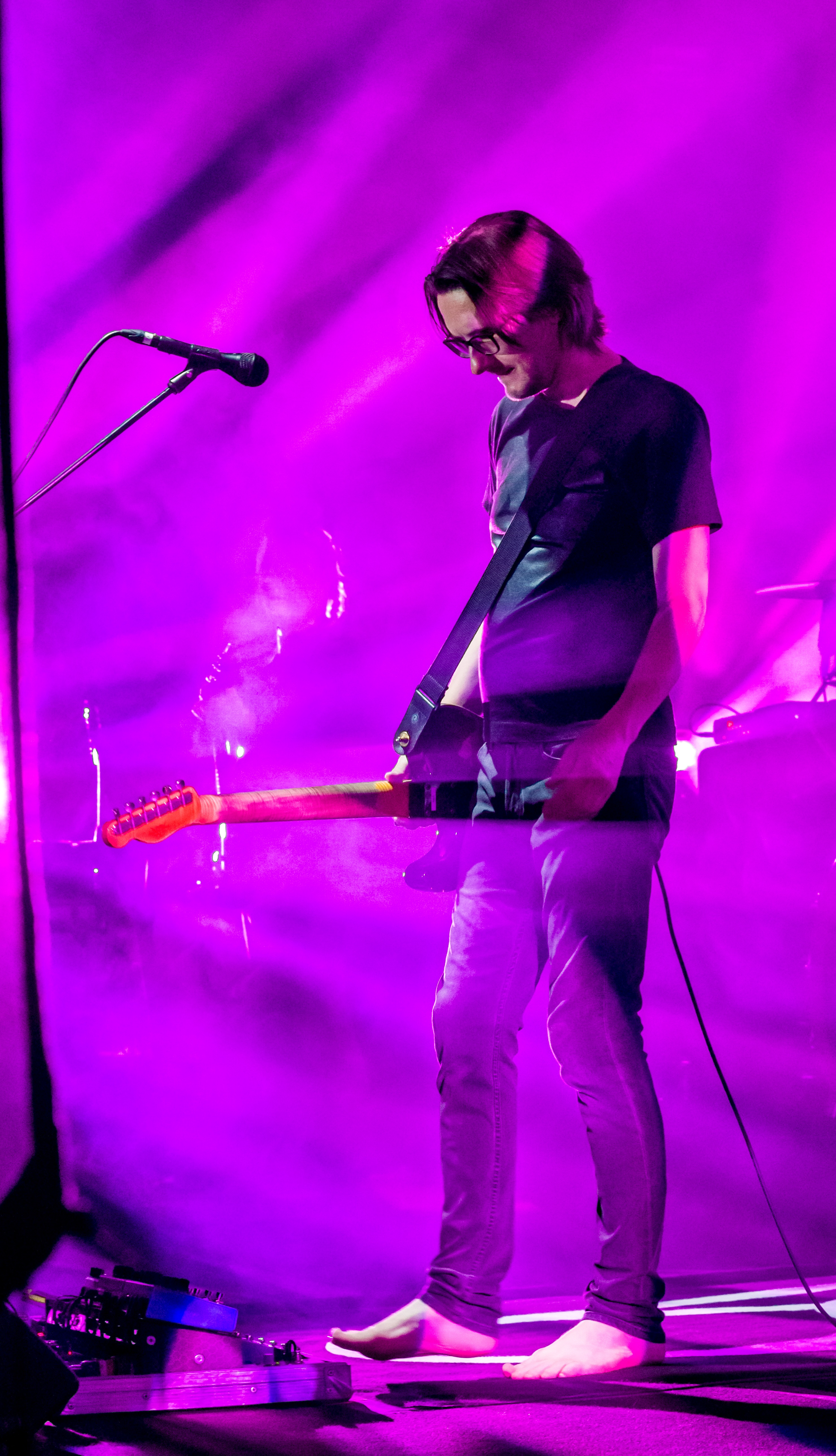 Bilder vom Zelt Musik Festival 2018 in Freiburg im Breisgau Das Eröffnungskonzert mit Steven Wilson